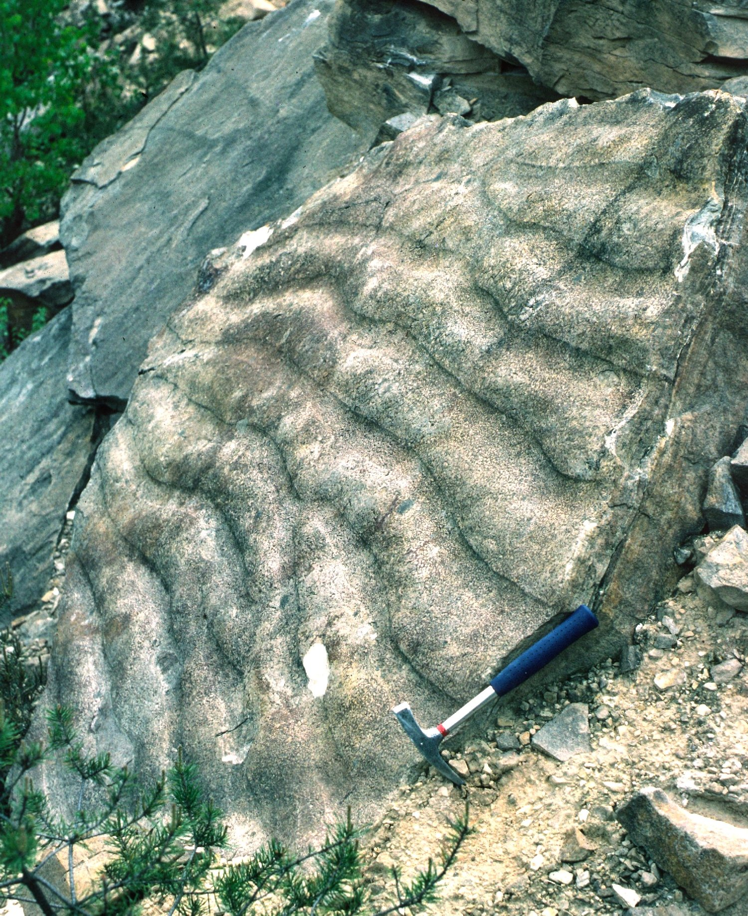 fossile Rippelmarken, Haßberge, Bayern, Deutschland. Geotopkataster Bayern Ehem. Sandsteinbruch Eichelberg S. von Burgpreppach, Geotop-Nummer: 674A004.